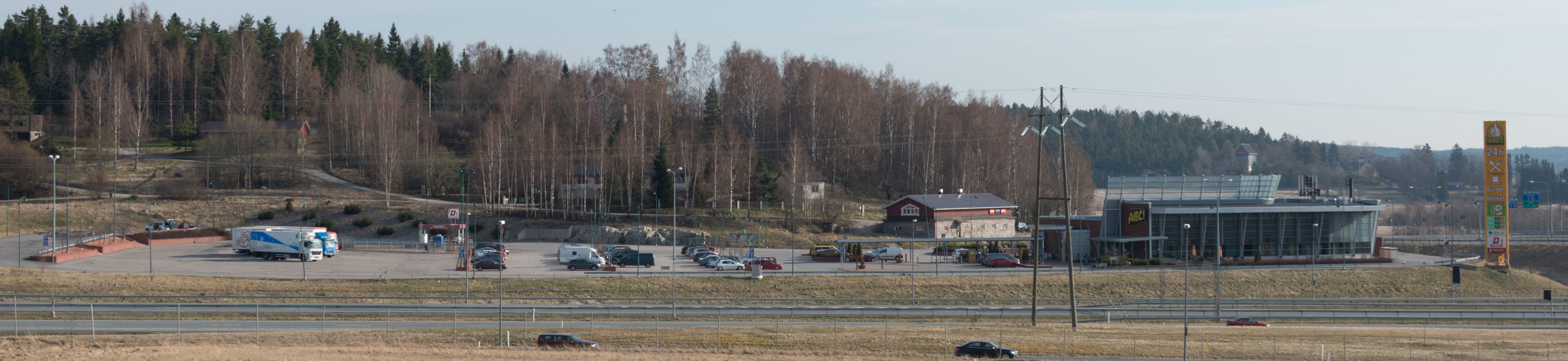 Lähikuva piihovin pihasta